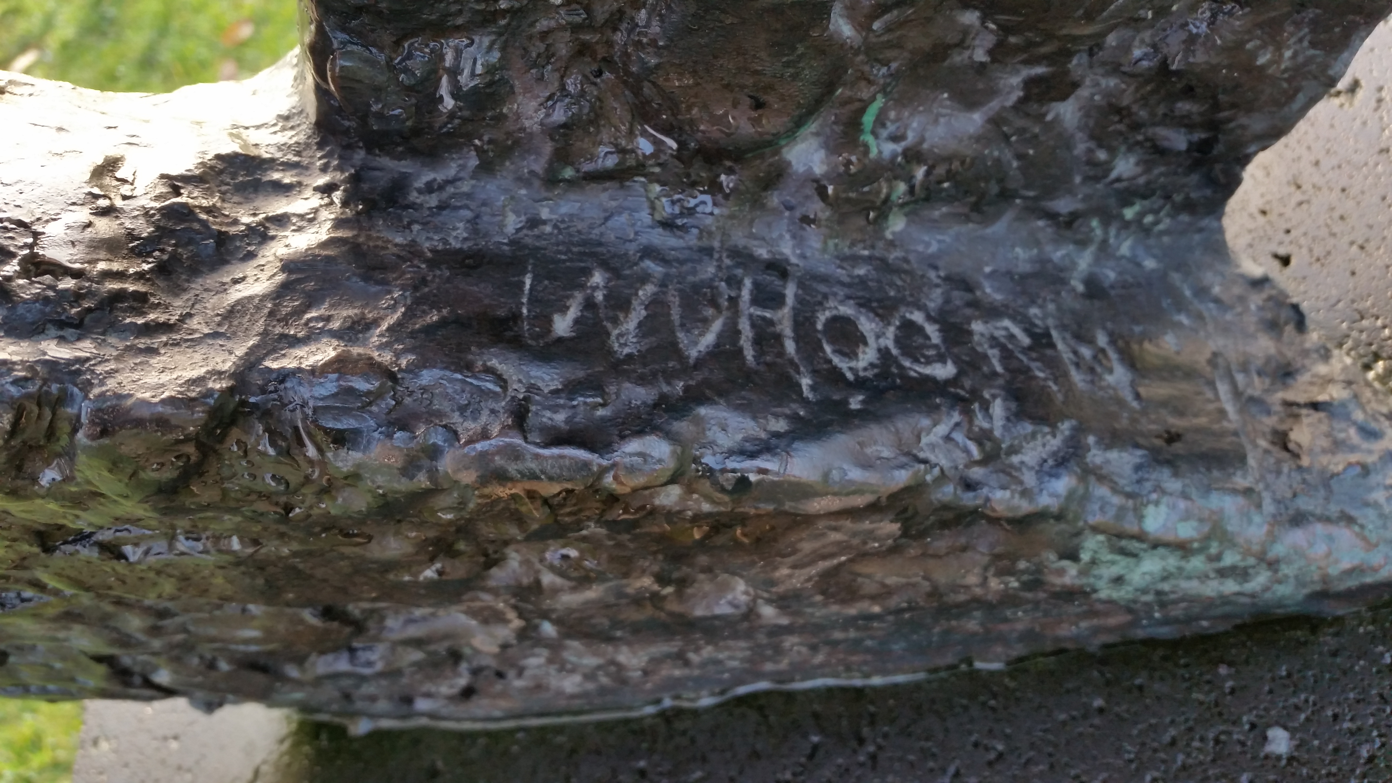 Ondertekening Kosmos (Wim van Hoorn)